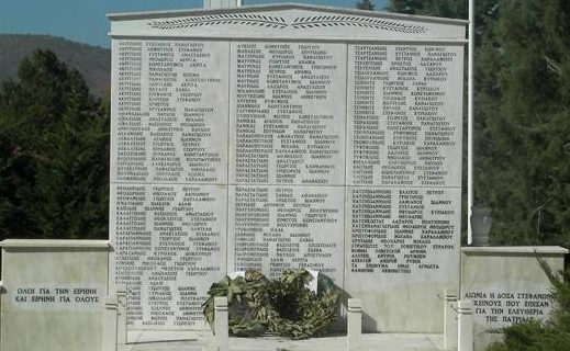 Monumento en recuerdo de las víctimas de las masacres de Mesovouno